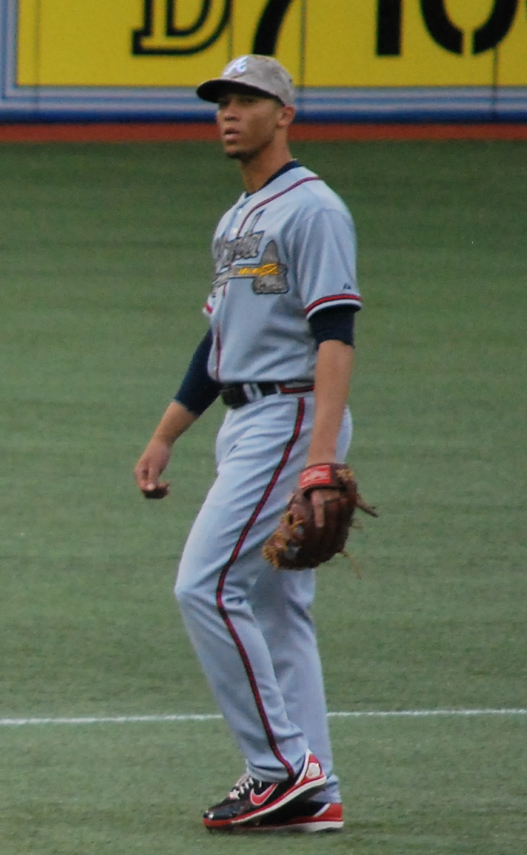 Andrelton Simmons